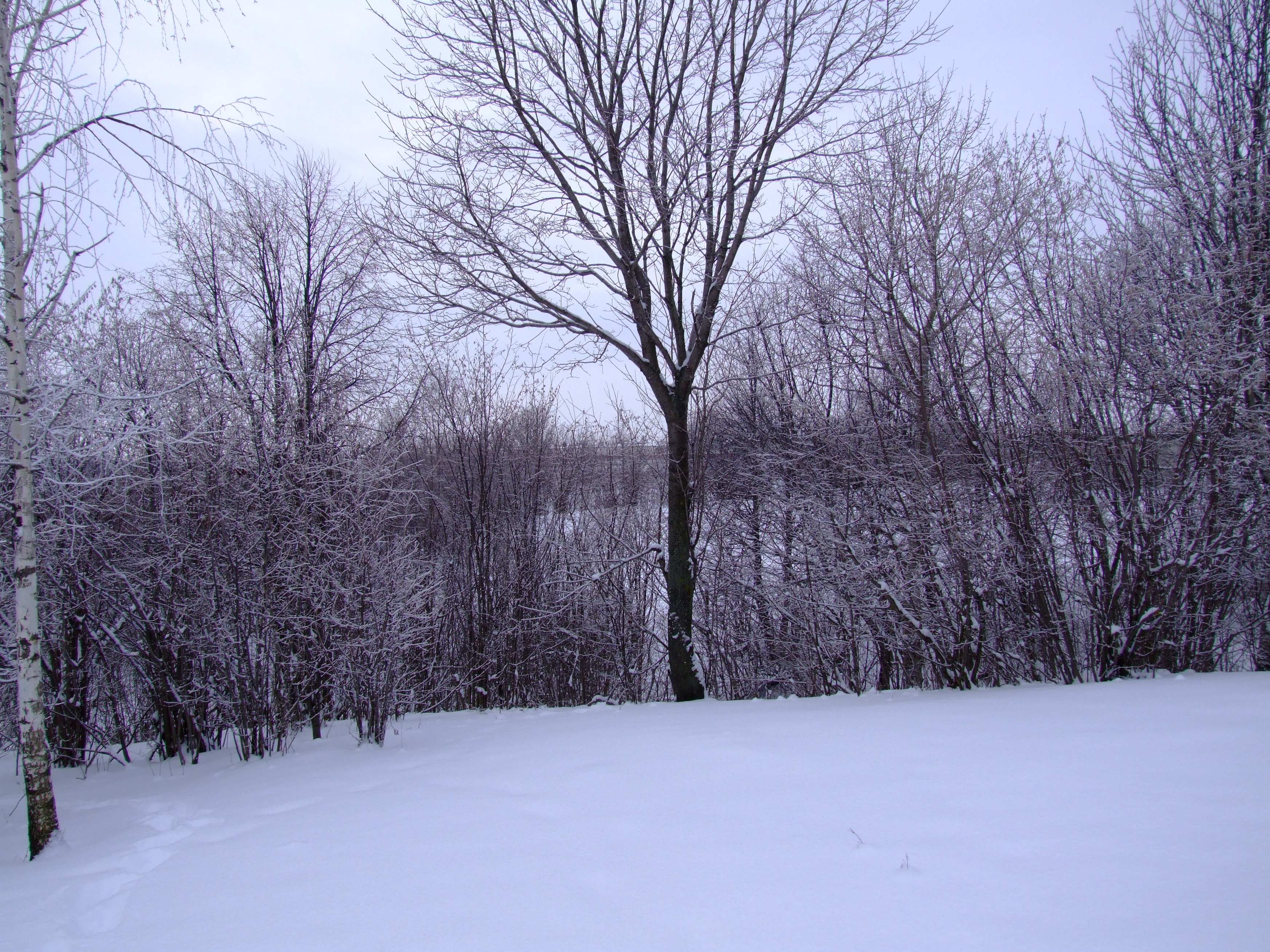 Чӑвашла: Киремет вӑрманӗ хӗлле.